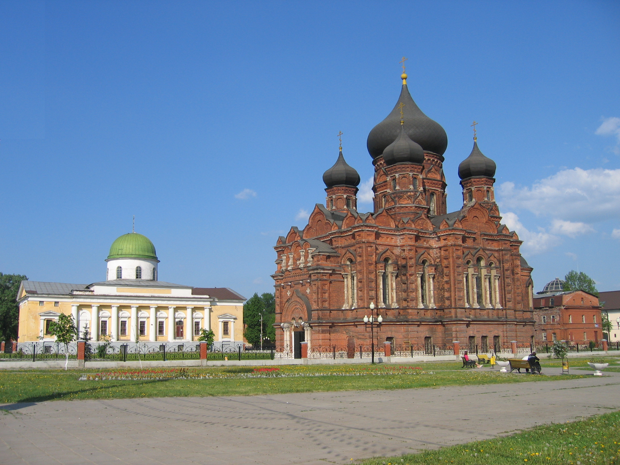 Собор бывшего Успенского монастыря в Туле